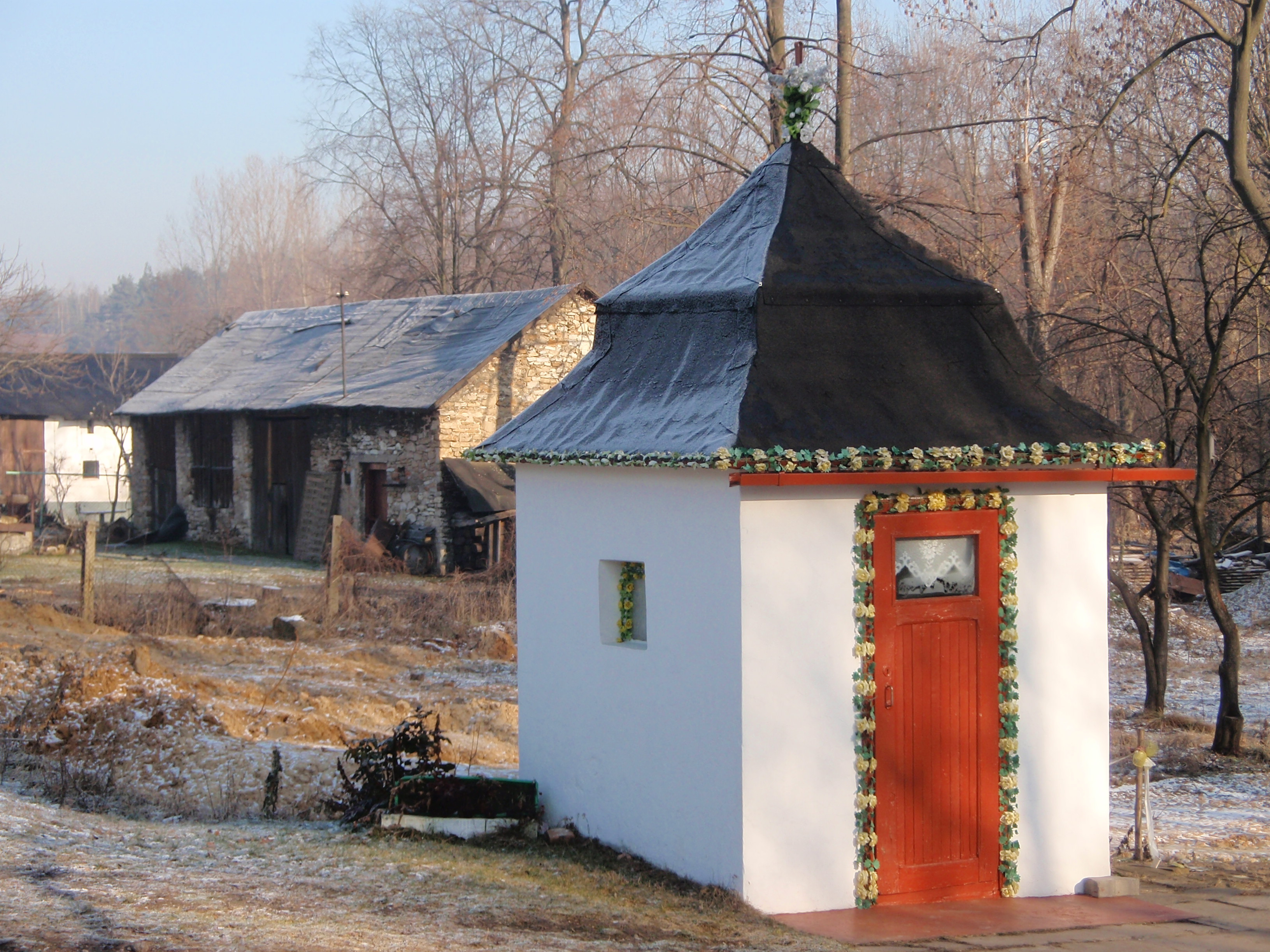 Kapliczka św. Antoniego przy ul. Zakawie w Dąbrowie Górniczej.